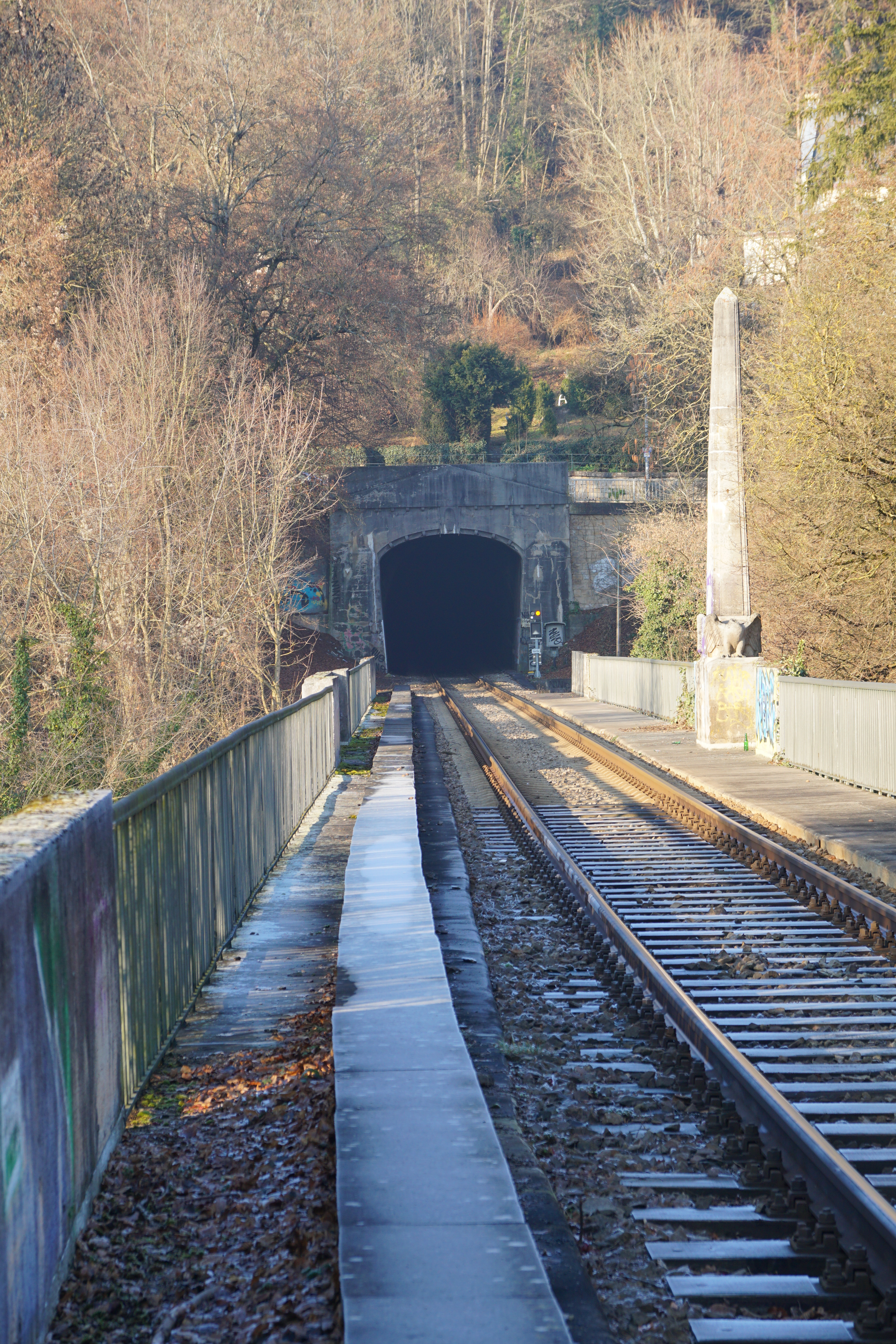 Schlossbergtunnel Tübingen der Ammertalbahn, Südportal.